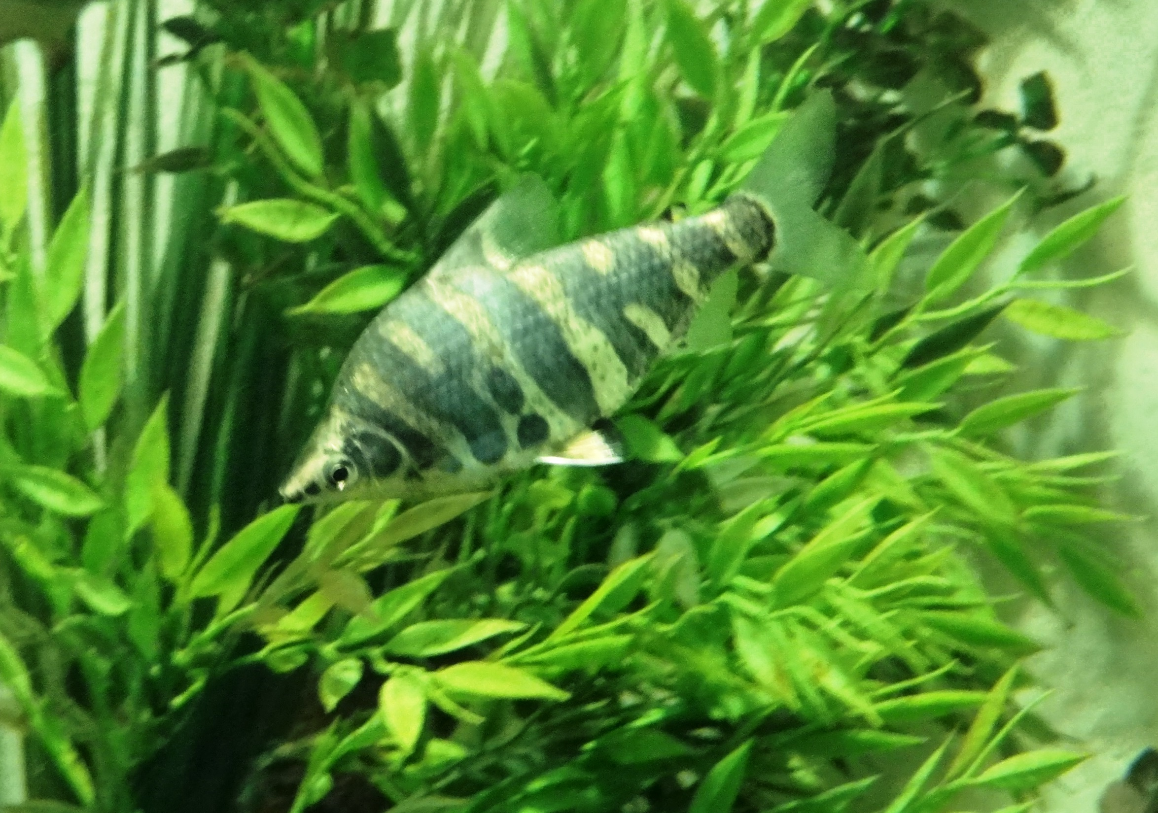 Abramites hypselonotus en el acuario del Zoológico de Cali, Colombia